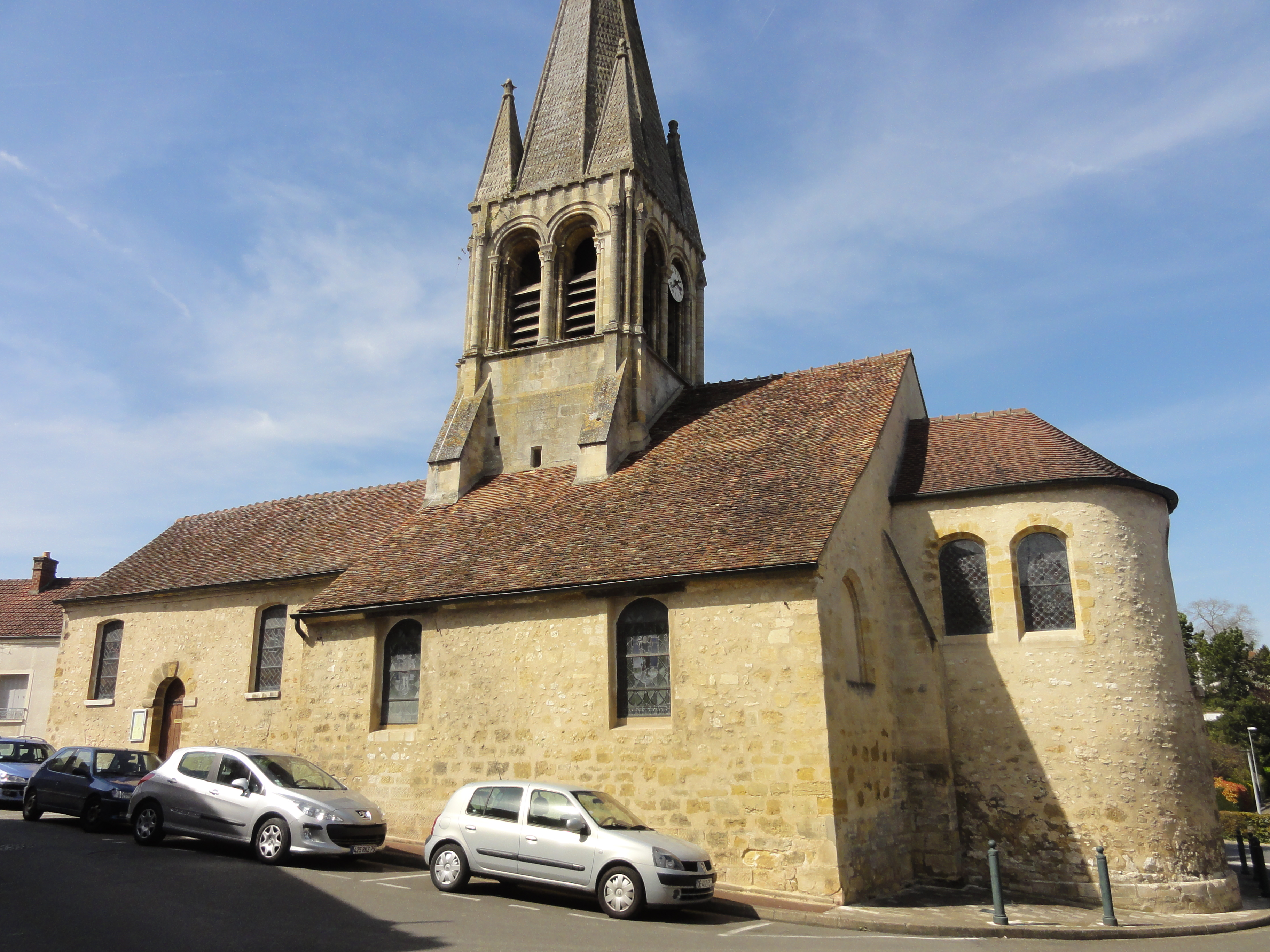 Église Saint-Germain-de-Paris de Hardricourt - voir titre.